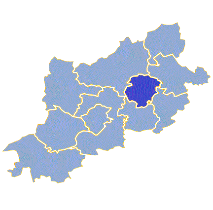 Powiat zielonogórski - Gmina Trzebiechów